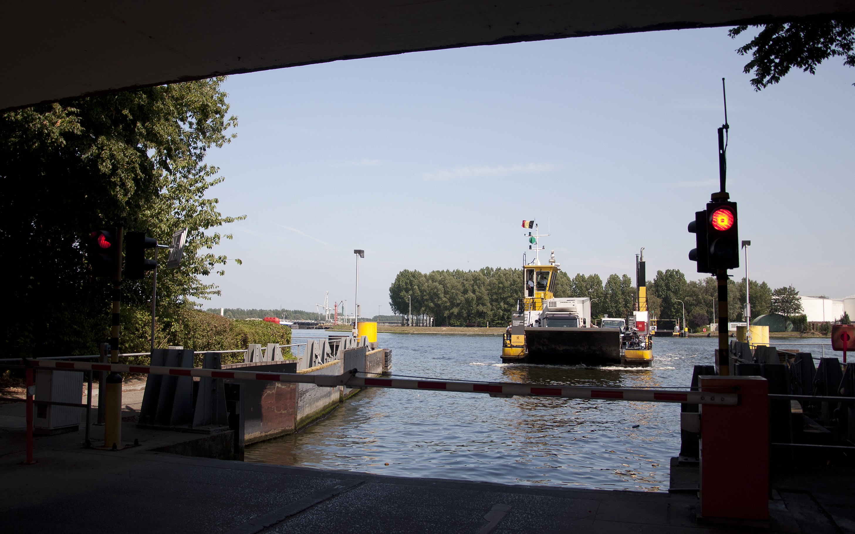 Veer B10 Terdonk-Doornzele vanaf de oever te Terdonk, over het kanaal Gent-Terneuzen, België